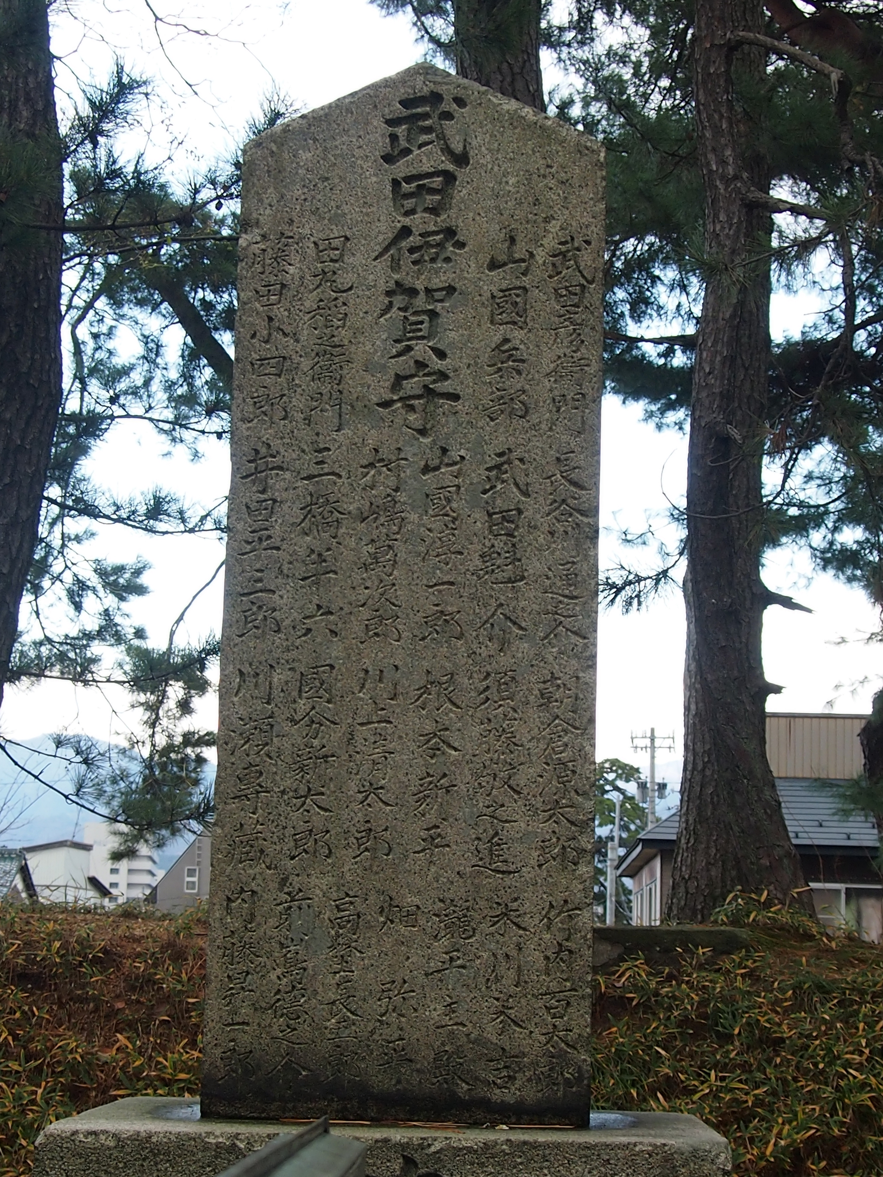 15基ある墓碑の一つ。武田耕雲斎以下24名の氏名が刻まれた墓碑。